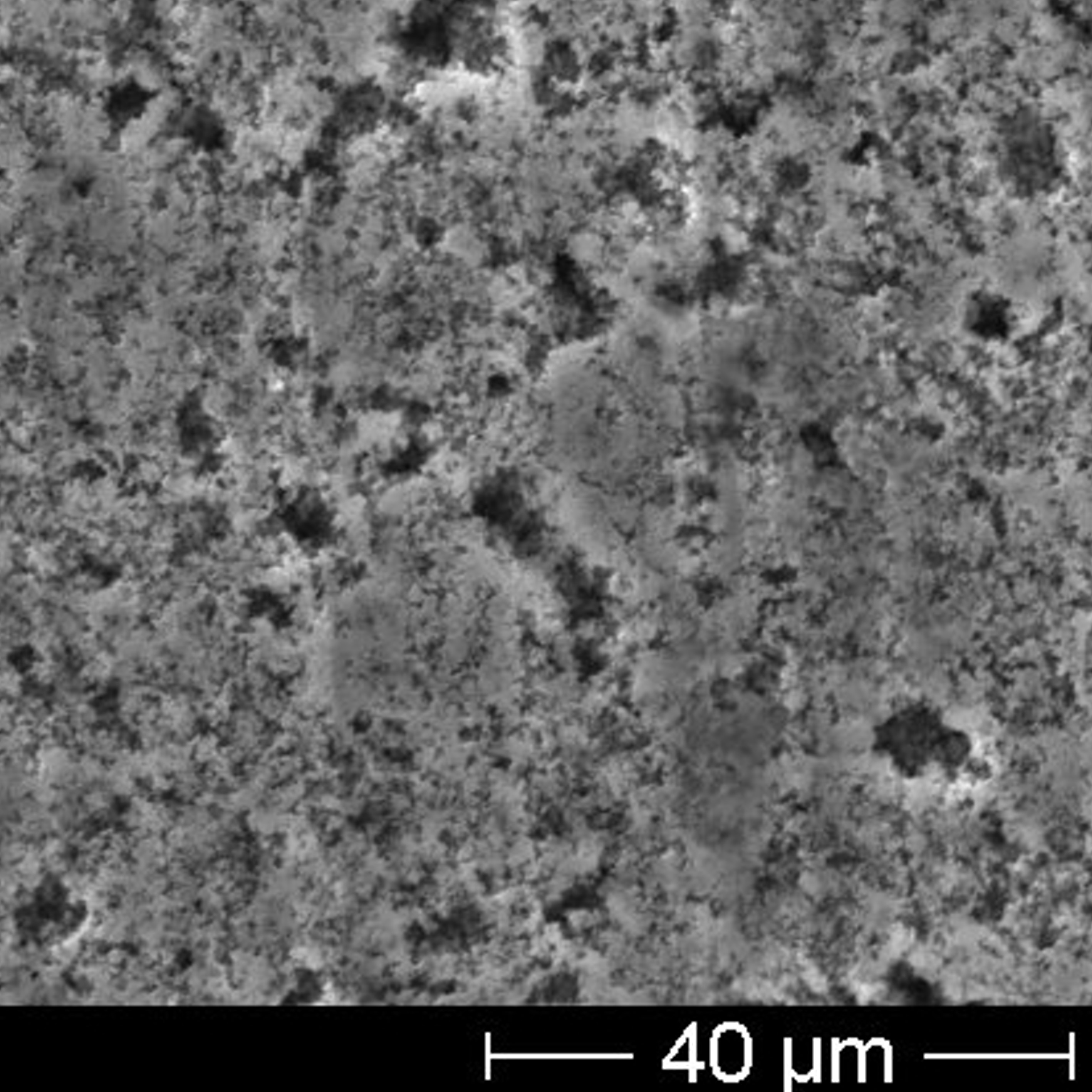 Anodenoberfläche eines "frischen" Niedervolt Elkos